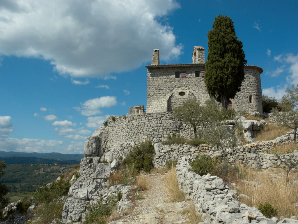 Ermitage St Eugène dans le bois de Païolive en Ardèche. On trouve plusieurs chemins de randonnée dans ce bois exceptionnel où des rochers calcaire aux formes variées et parfois étranges parsèment le sol. L'ermitage n'est ouvert que sur demande ou pour des événements religieux, on l'aperçoit cependant du chemin quand on approche de la falaise d'où l'ermitage domine le village de Chassagne en contrebas. To learn more